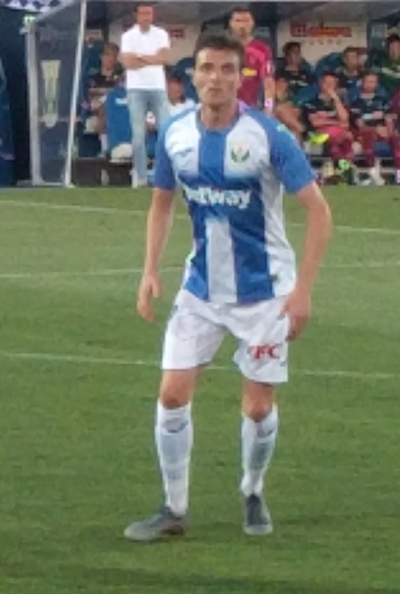 Óscar Rodríguez en el XL Trofeo Villa de Leganés, con la camiseta del Leganés